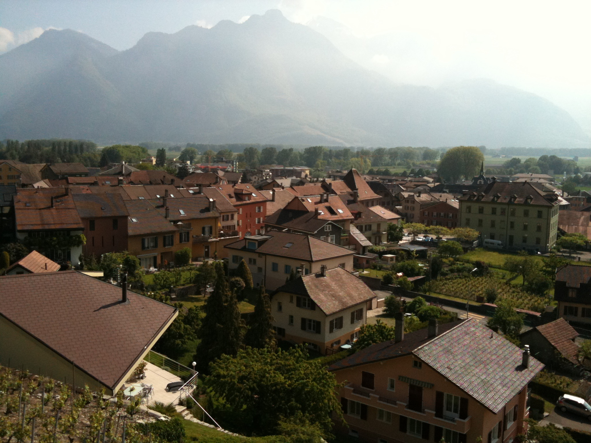 Vouvry im Kanton Wallis